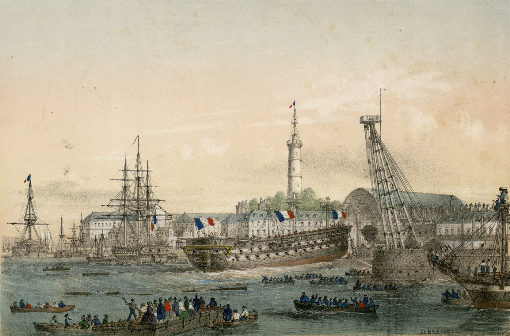 Lithographie de l'intérieur du port militaire de Lorient , fait par Louis Le Breton dans les années 1860